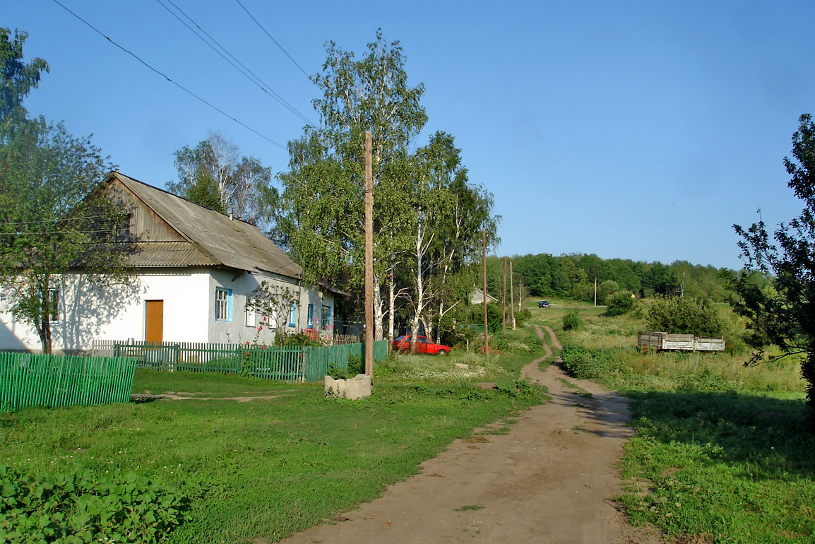 Волчково